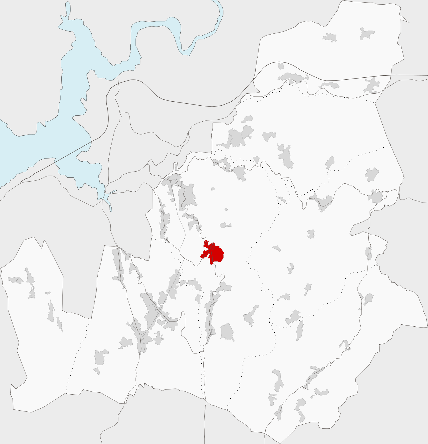 Ubicación da localidade de Aldeagrande no concello de Lousame.